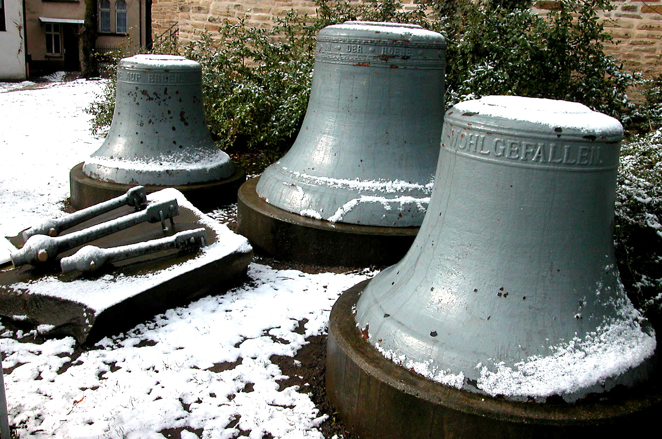 Ehemalige Stifts, heute evangelische Pfarrkirche von Herdecke. Die Glocke.